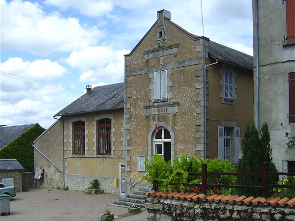 Mairie de Chalaux (Nièvre)